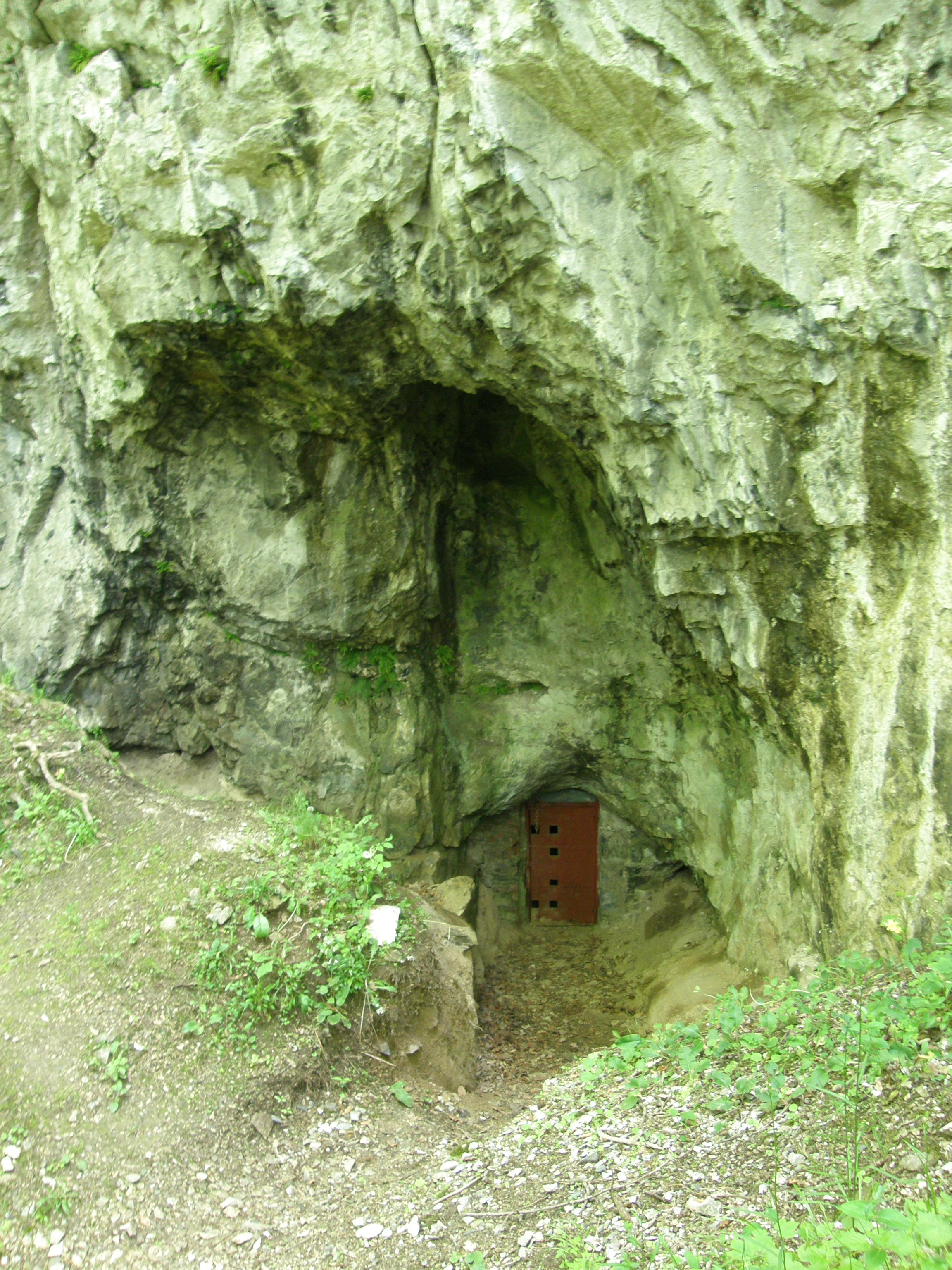 Sobolova (Barová) jeskyně